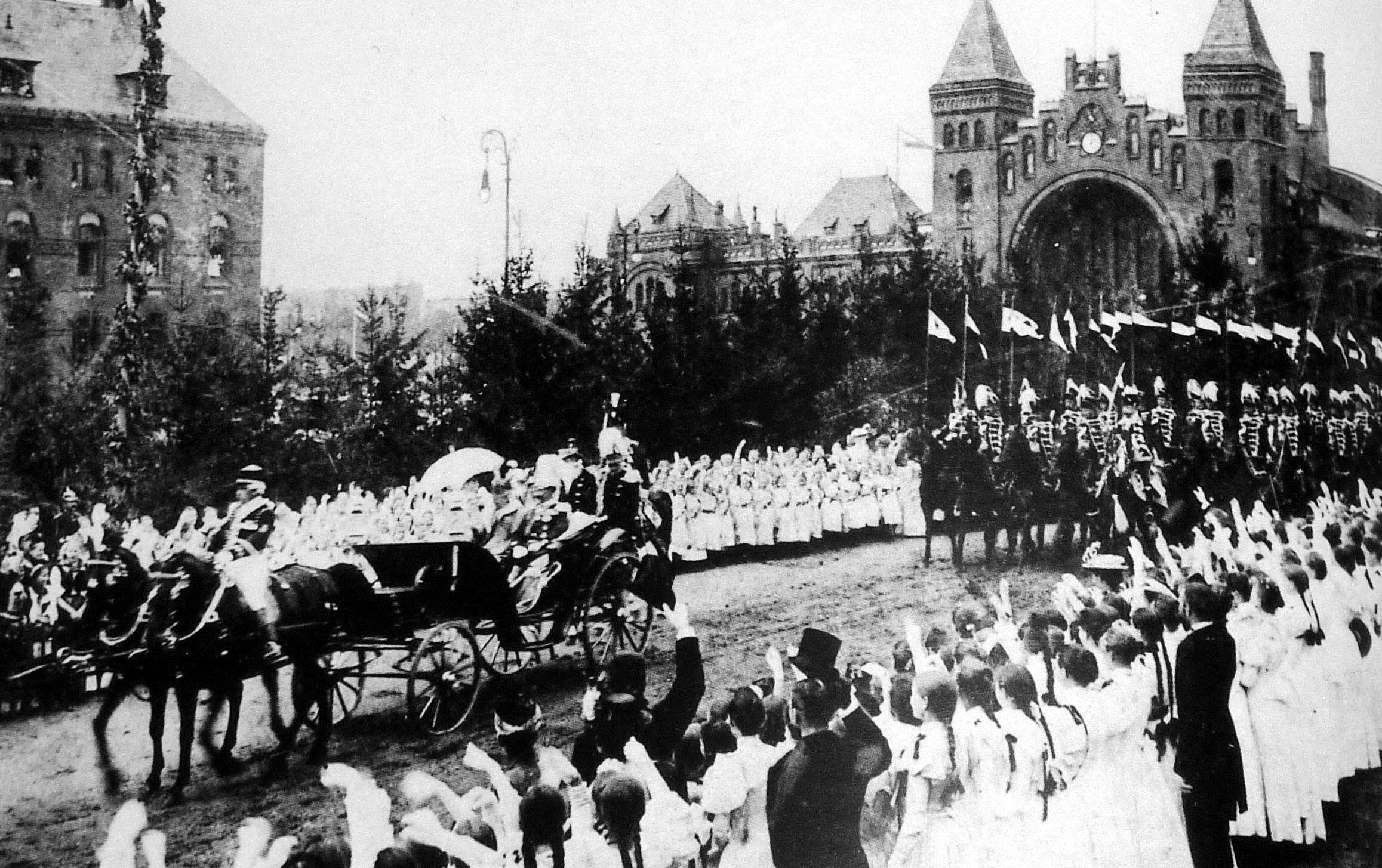 Kaiserparade in Altona, die Tannen im Hintergrund kaschieren wohl die Baustelle des Stuhlmannbrunnens. Das Bild zeigt den Kaiser an der Spitze einer Formation. Das Kaisermanöver fand in jenem Jahr zwischen dem VII. und X. Korps statt. Der Anlass des Kaiserbesuches war die Eröffnung des neuen Altonaer Rathauses (ex. BHF). Die hiesige Kaiserparade stand also im Zusammenhang mit dem Rathaus und NICHT eines Kaisermanövers.